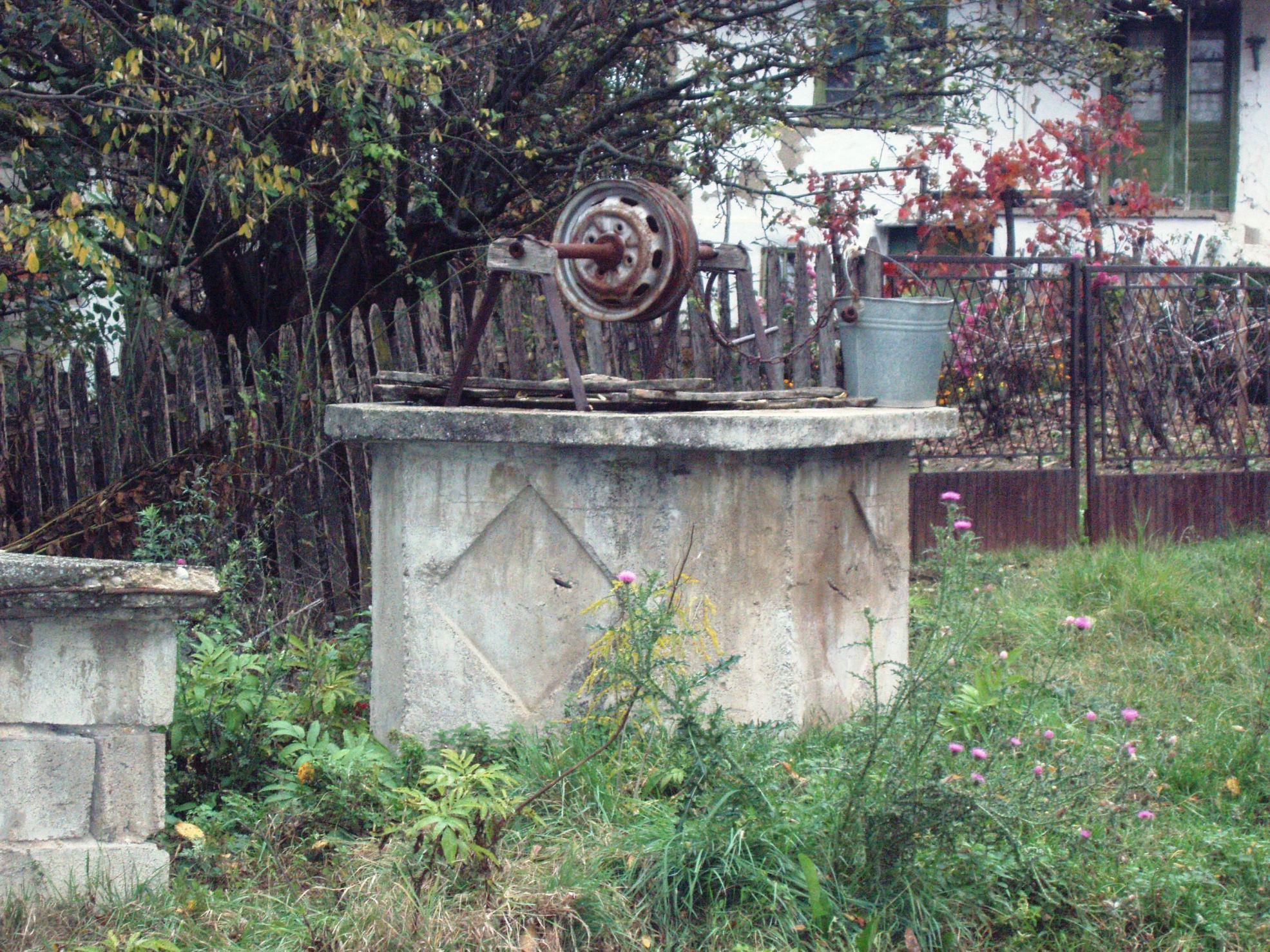 Бунар у Рујишту.